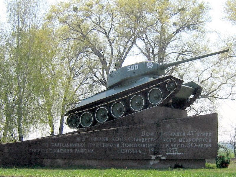 Танк, Піщане